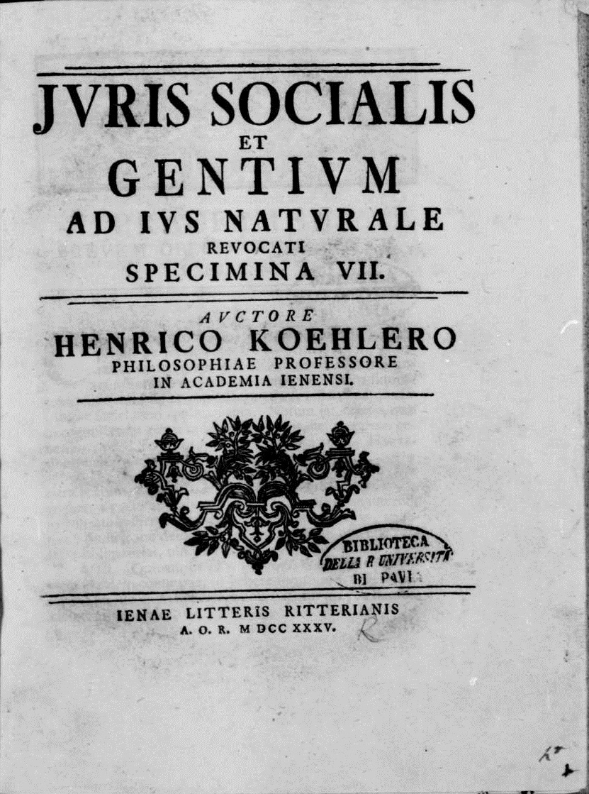 Frontespizio